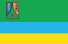 Прапор Варвинського району